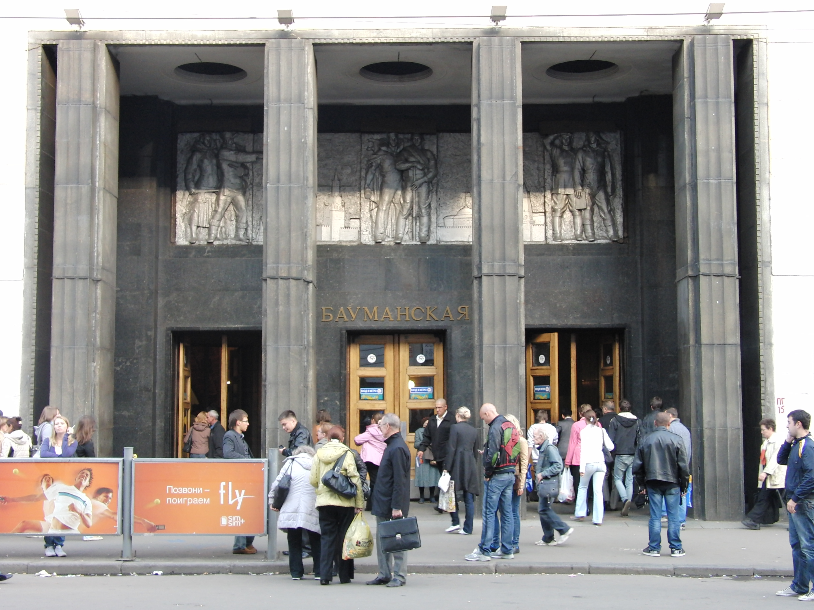 Vestibule of Baumanskaya station (Вестибюль станции Бауманская)